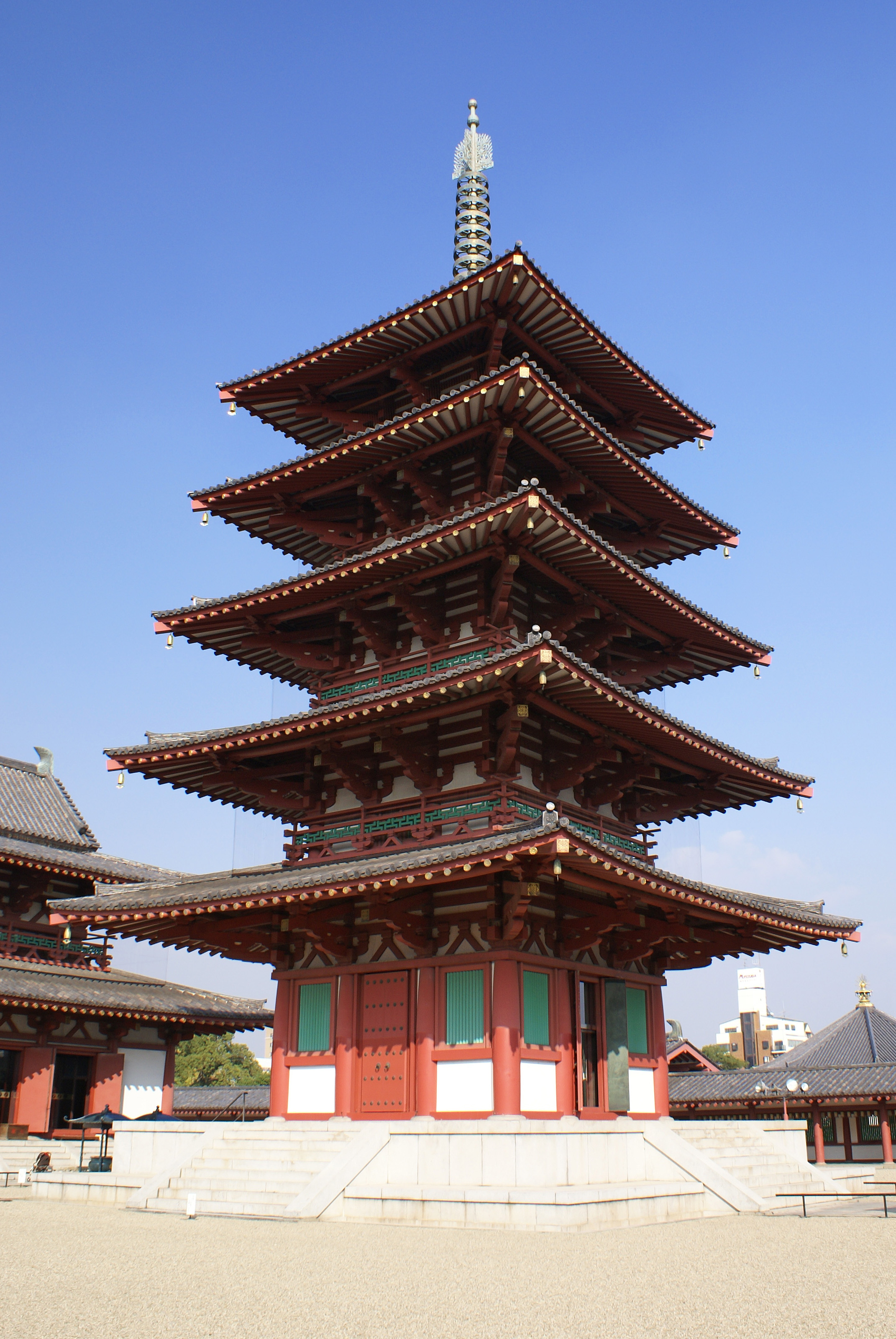 Shitennō-ji in Osaka, Japan